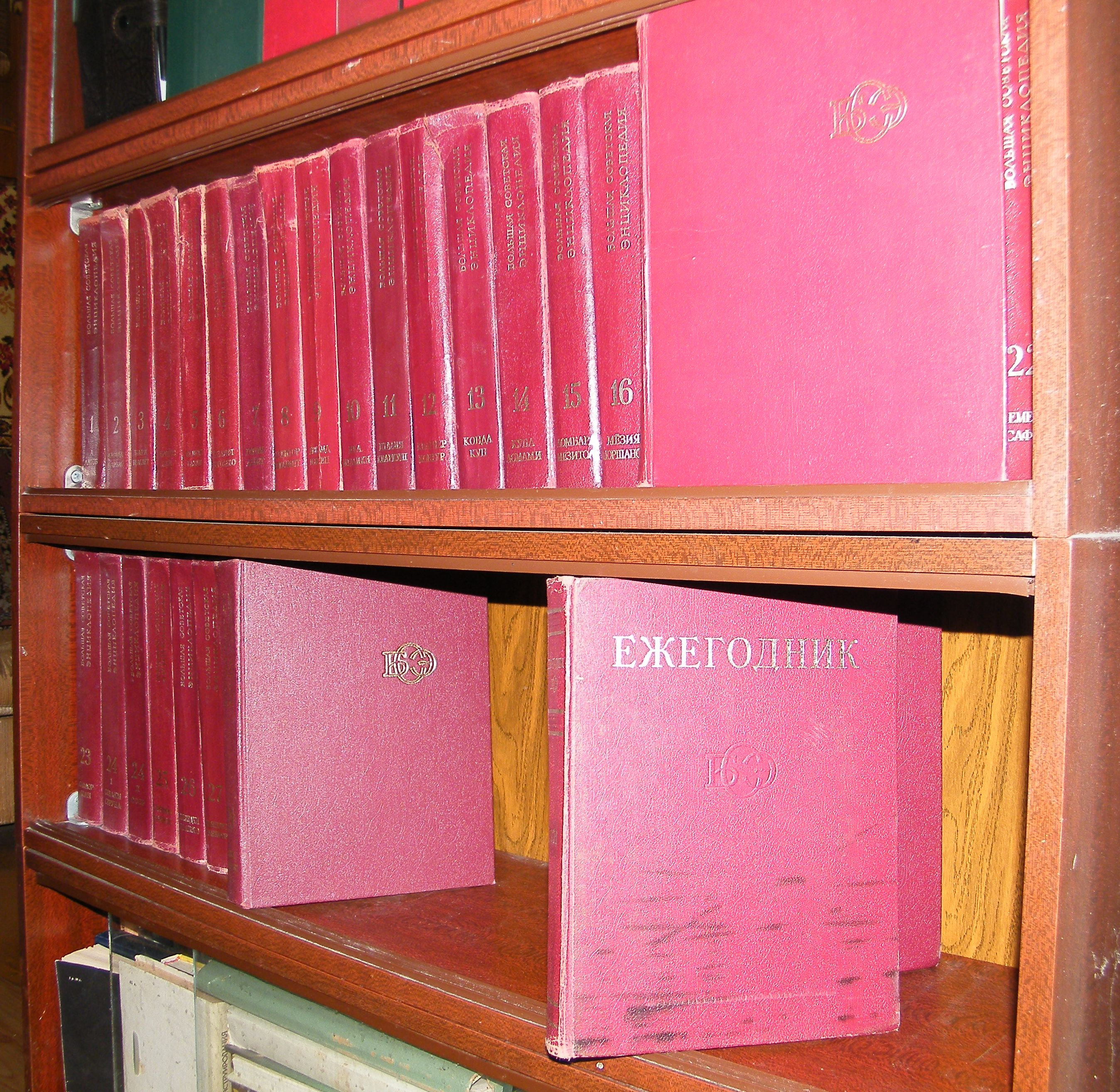 Большая советская энциклопедия, 3 издание